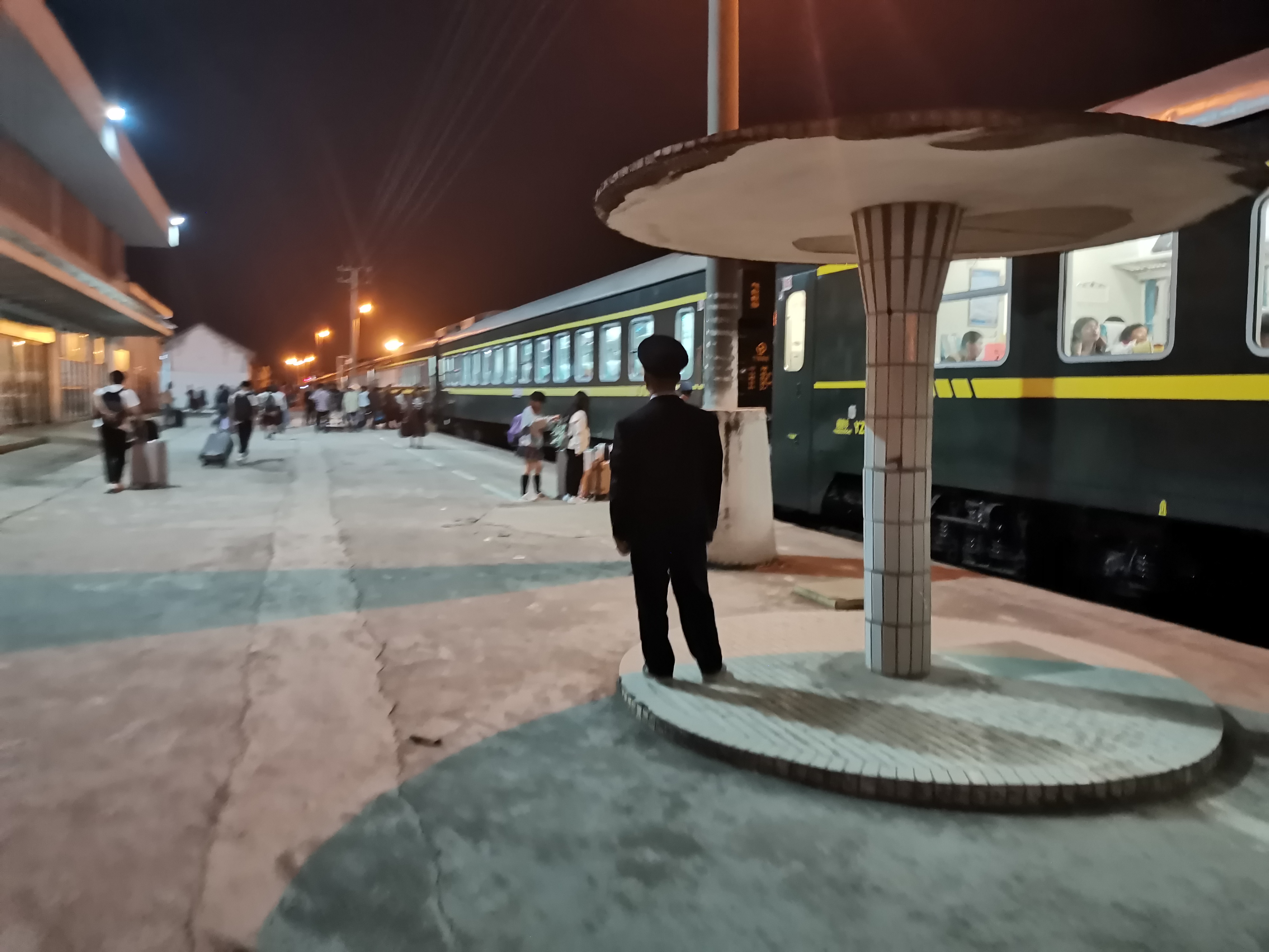 广西崇左 扶绥火车站